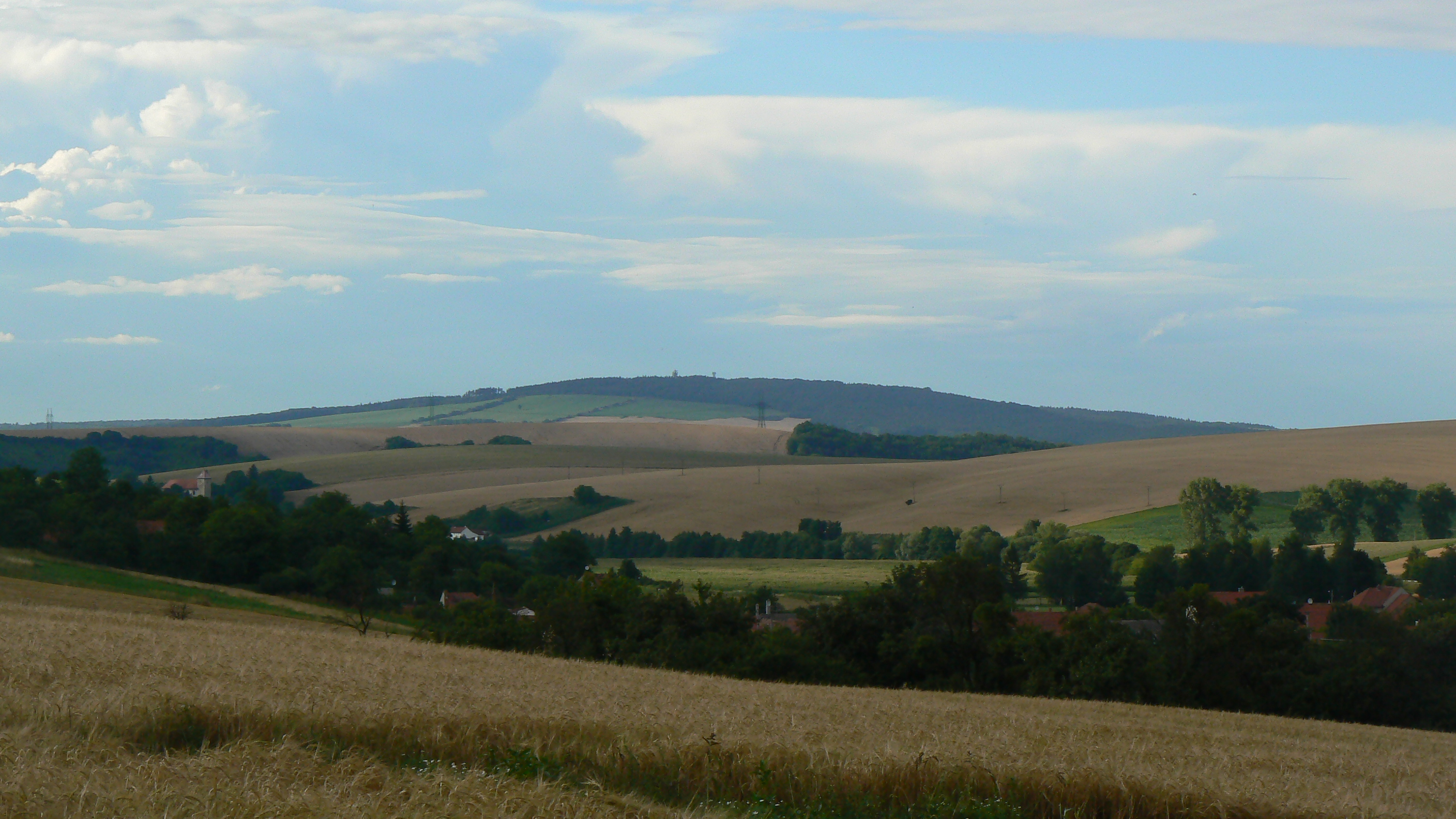 Hradisko (518 m n. m.) - nejvyšší vrchol Litenčické pahorkatiny, pohled od Mouchnic